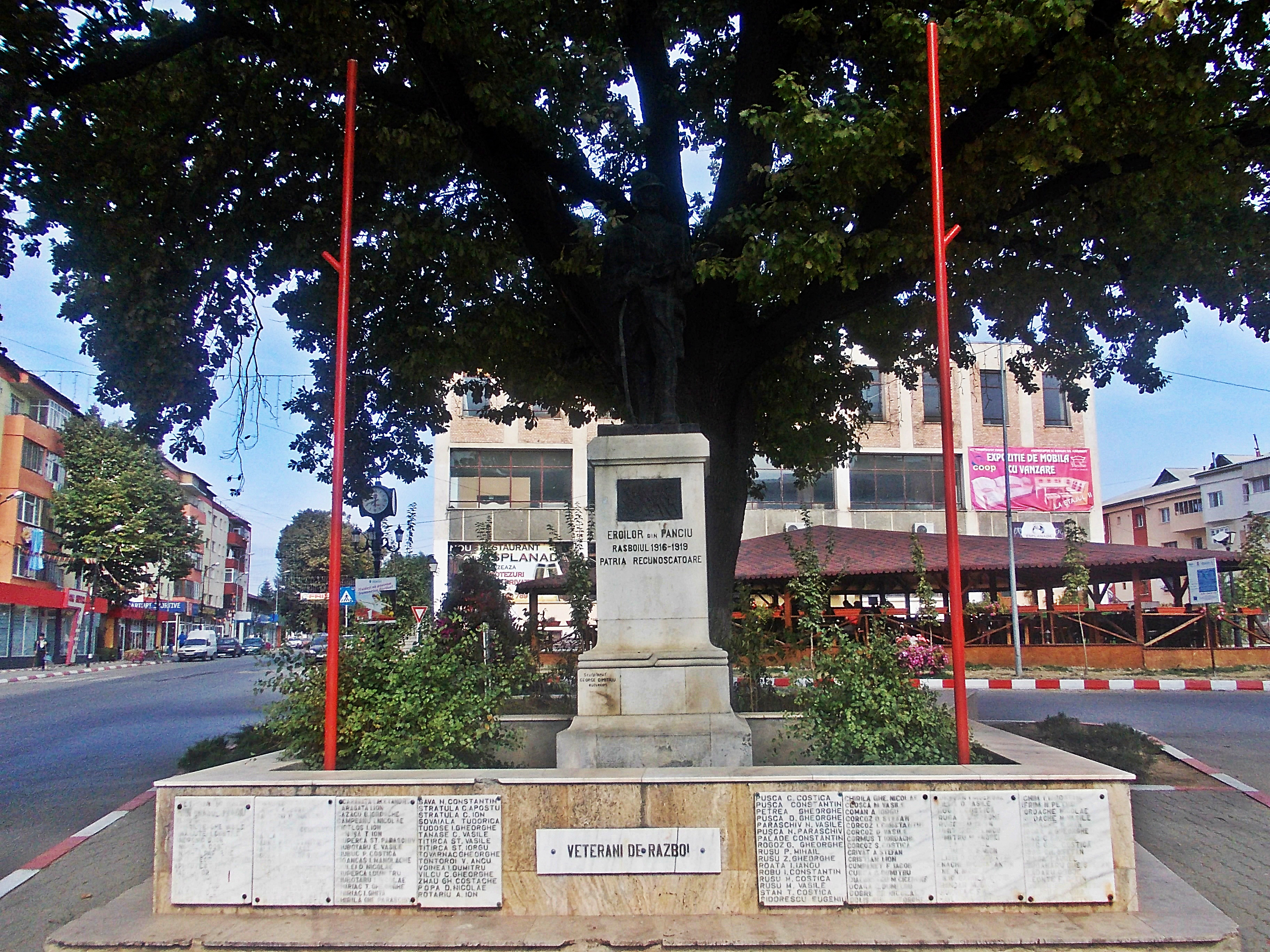 oraș Panciu, str. Titulescu Nicolae